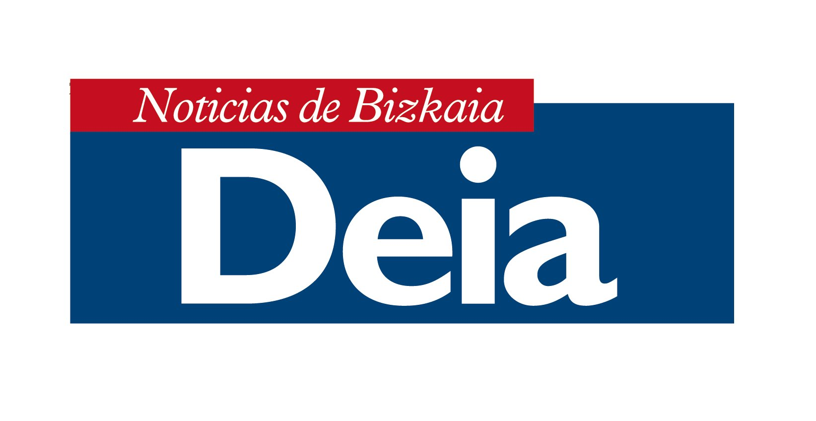 Deia egunkariaren logoa